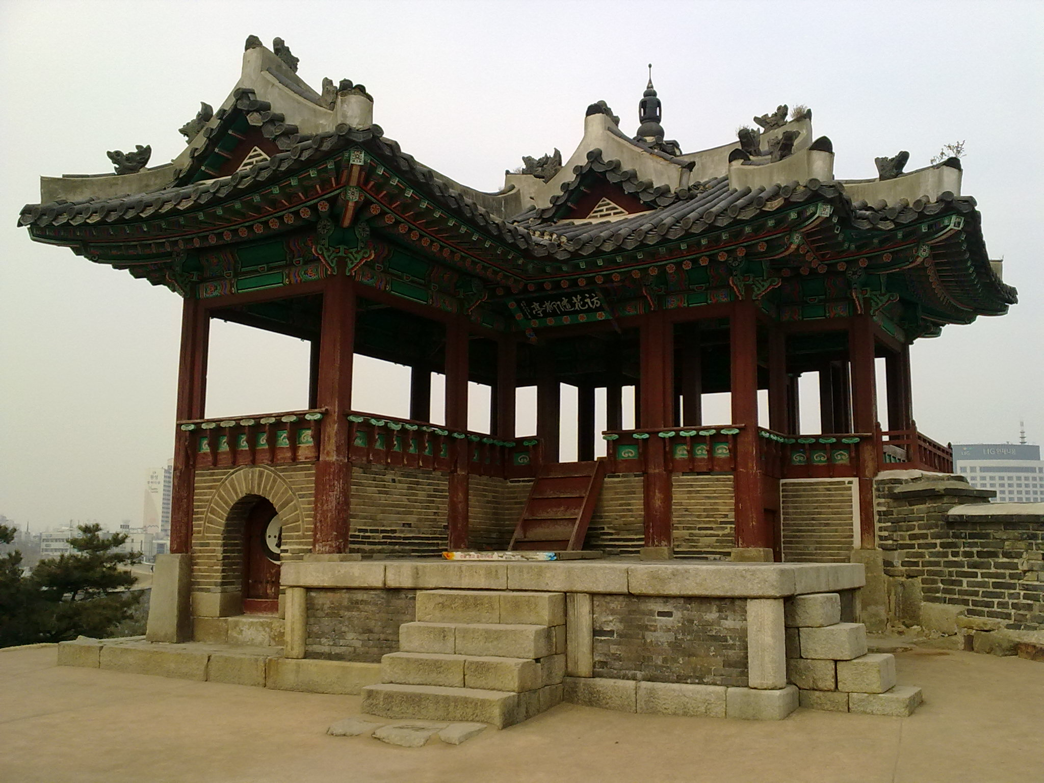 수원 화성 동북각루(방화수류정)